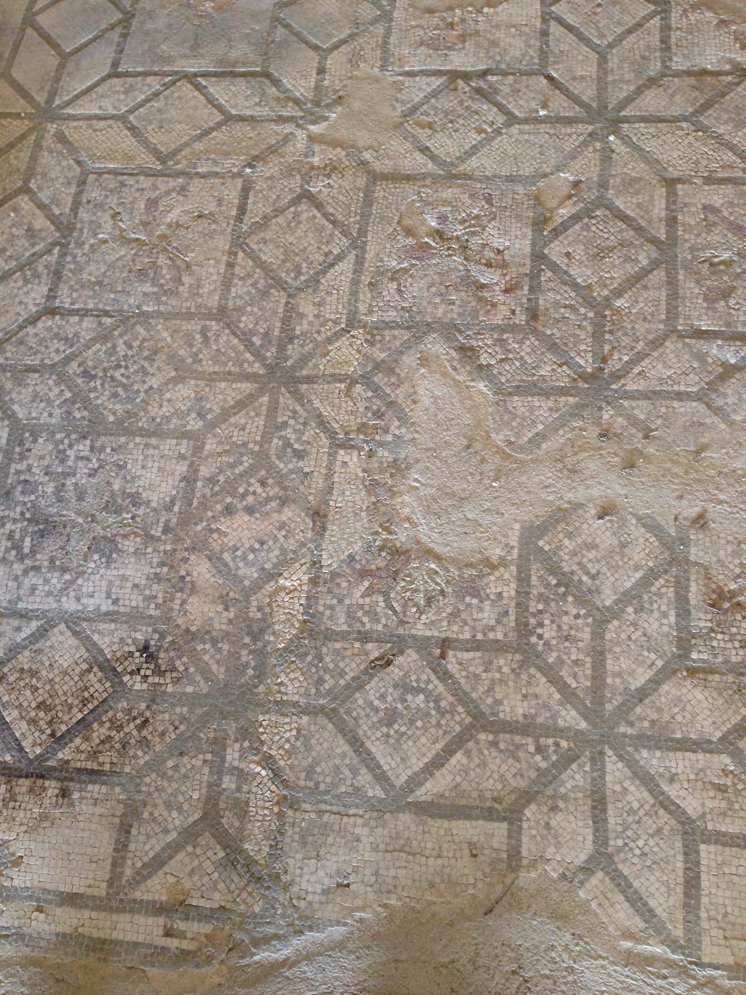 Villa romana di Cottanello . Pavimentazione di camera. Mosaico a quadrati con stelle a otto losanghe.